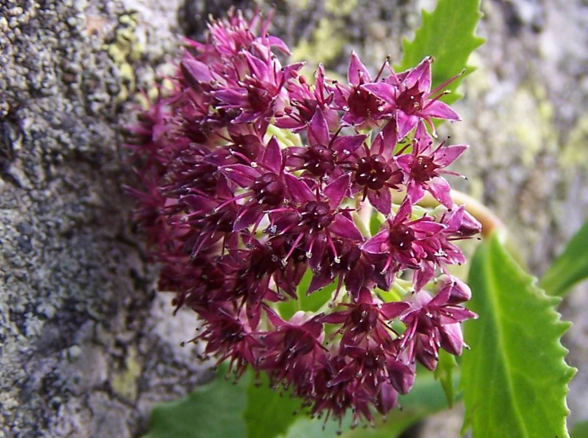 Sedum fabaria (pl. rozchodnik karpacki), habitat: Tatra Mountains, Dolina 5 Stawów Polskich